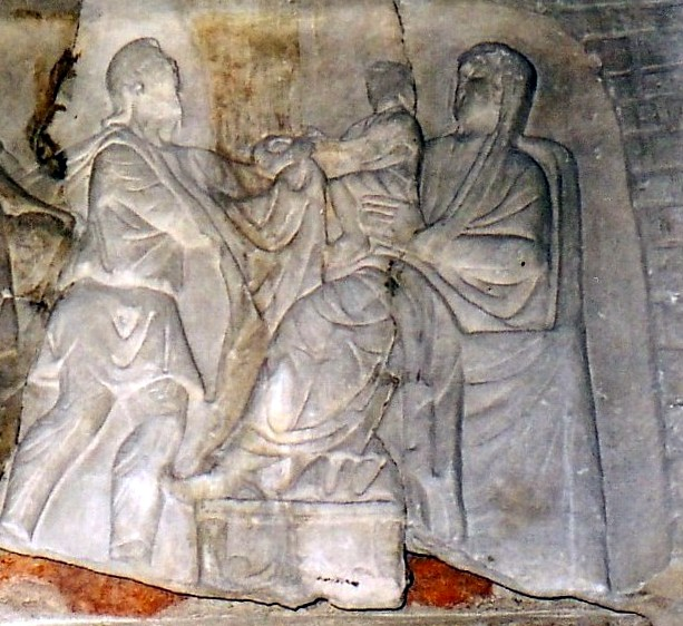 Torre campanile della Basilica dei santi Felice e Fortunato (Vicenza)